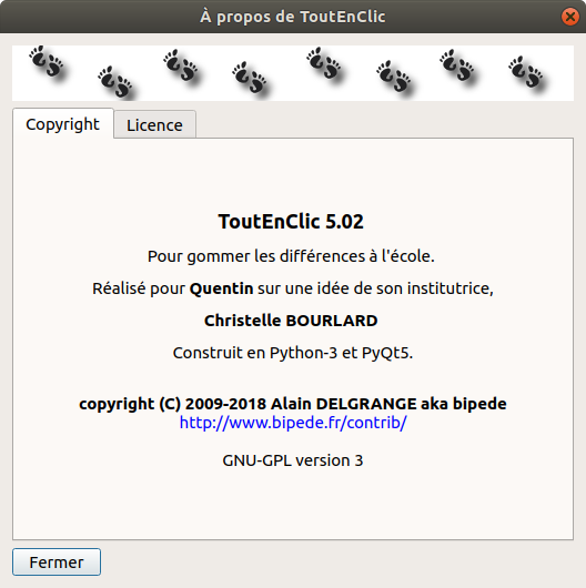 Capture d'écran ToutEnClic logiciel libre GPLV3